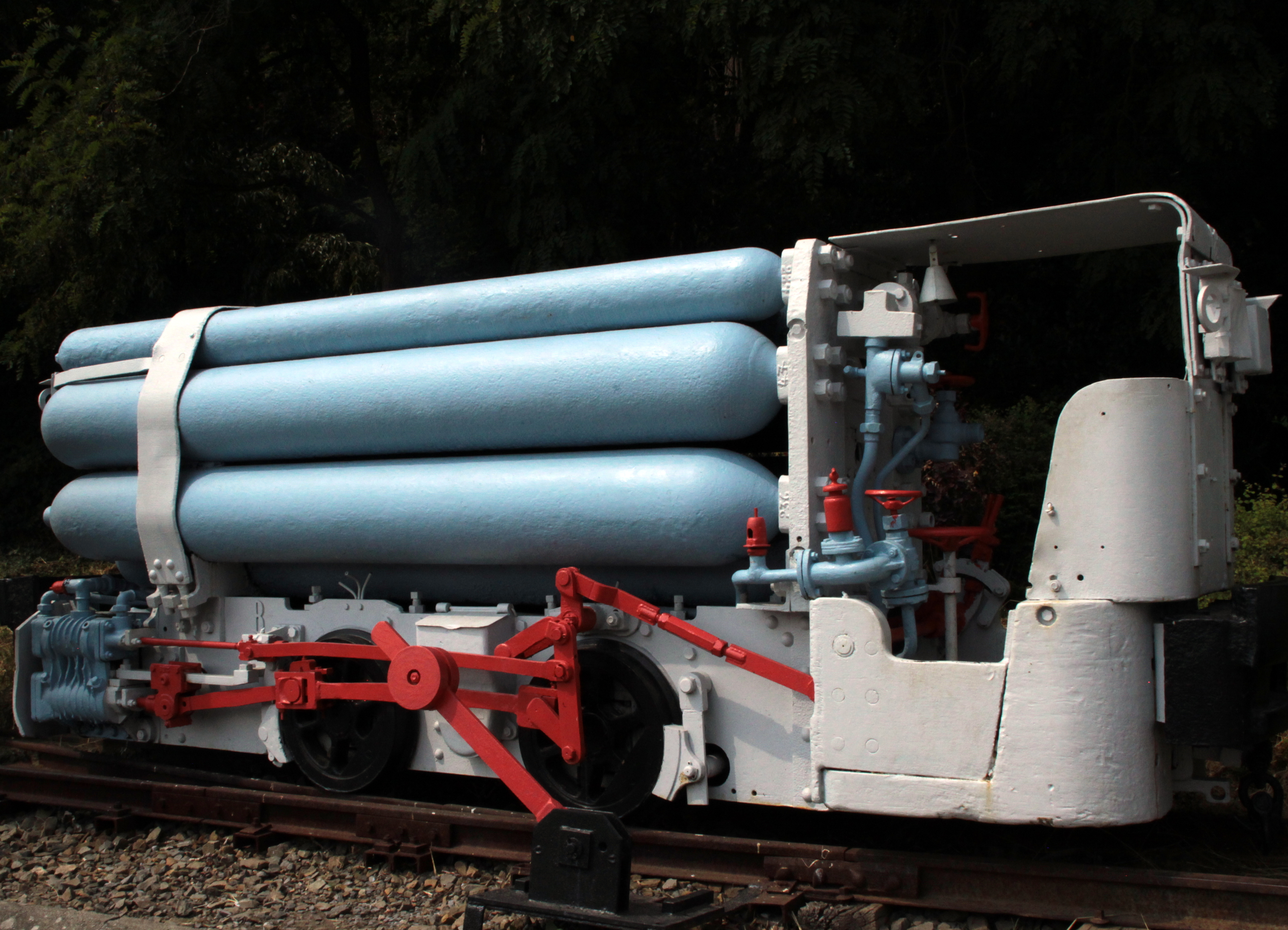 Drockloftlokomotiv wéi se a Kuelegrouwen agesat gouf. Ausstellungsstéck am Musée vun der Kuelegrouf vu Blegny